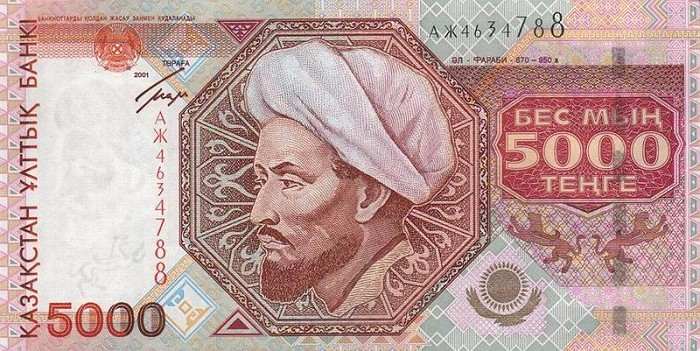 5.000 tenge